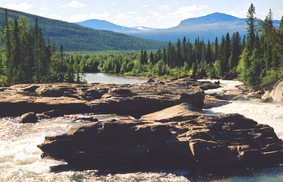 Der Kamajåkk bei Kvikkjokk, Norrbotten, Schweden